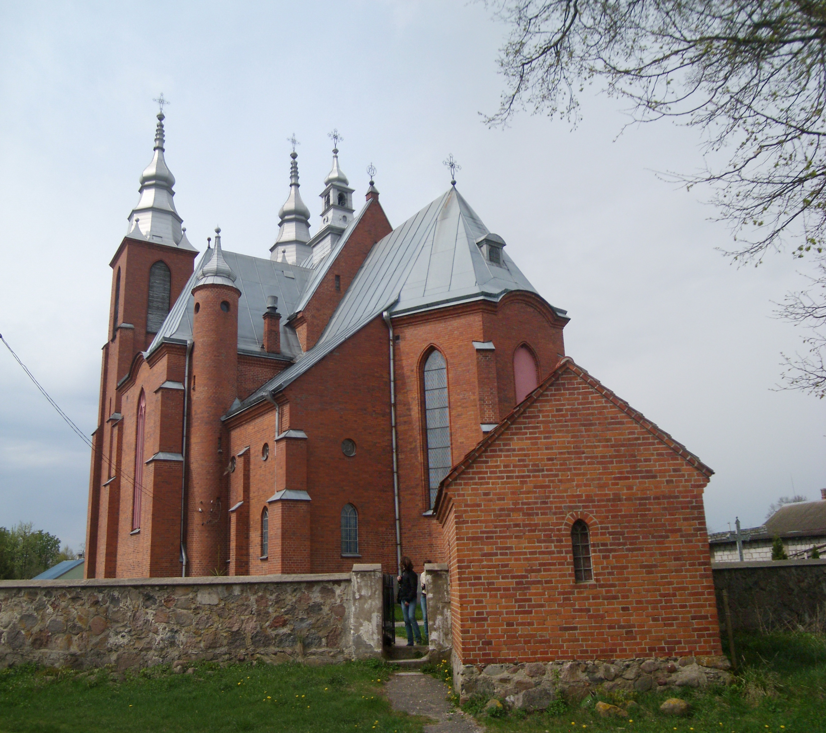 Беларуская (тарашкевіца): Касьцёл Яна Хрысьціцелядэкаратыўнае аздабленьне інтэр’еру:бакавы алтар,хрысьцільня ў правым нефе. в. Мсьцібава This is a photo of Belarusian heritage monument. Reference number: 412Г000110 ( WLM)